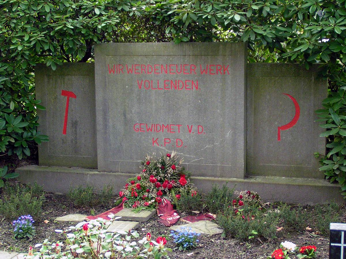 Ehrenmal auf dem Nordfriedhof in Dortmund-Eving. In diesem Grab liegen neun Tote der sogenannten Märzunruhen, den bewaffneten Widerstand gegen den Kapp-Lüttwitz-Putsch. Nachdem am 13. März 1920 die „Brigade Erhardt“ und andere gegen die Weimarer Republik putschten, kam es auch in Dortmund zu Auseinandersetzungen. In den Kämpfen vom 15. März wurde von einer großen Masse versucht, das Stadthaus zu stürmen. Die Polizei schlug den Angriff zurück, es gab dabei 13 Tote. Das Ehrenmal ist Bestandteil der Route der Industriekultur. Es ist in der Themenroute 22 – Mythos Ruhrgebiet aufgeführt. This is a photograph of an architectural monument. 1033